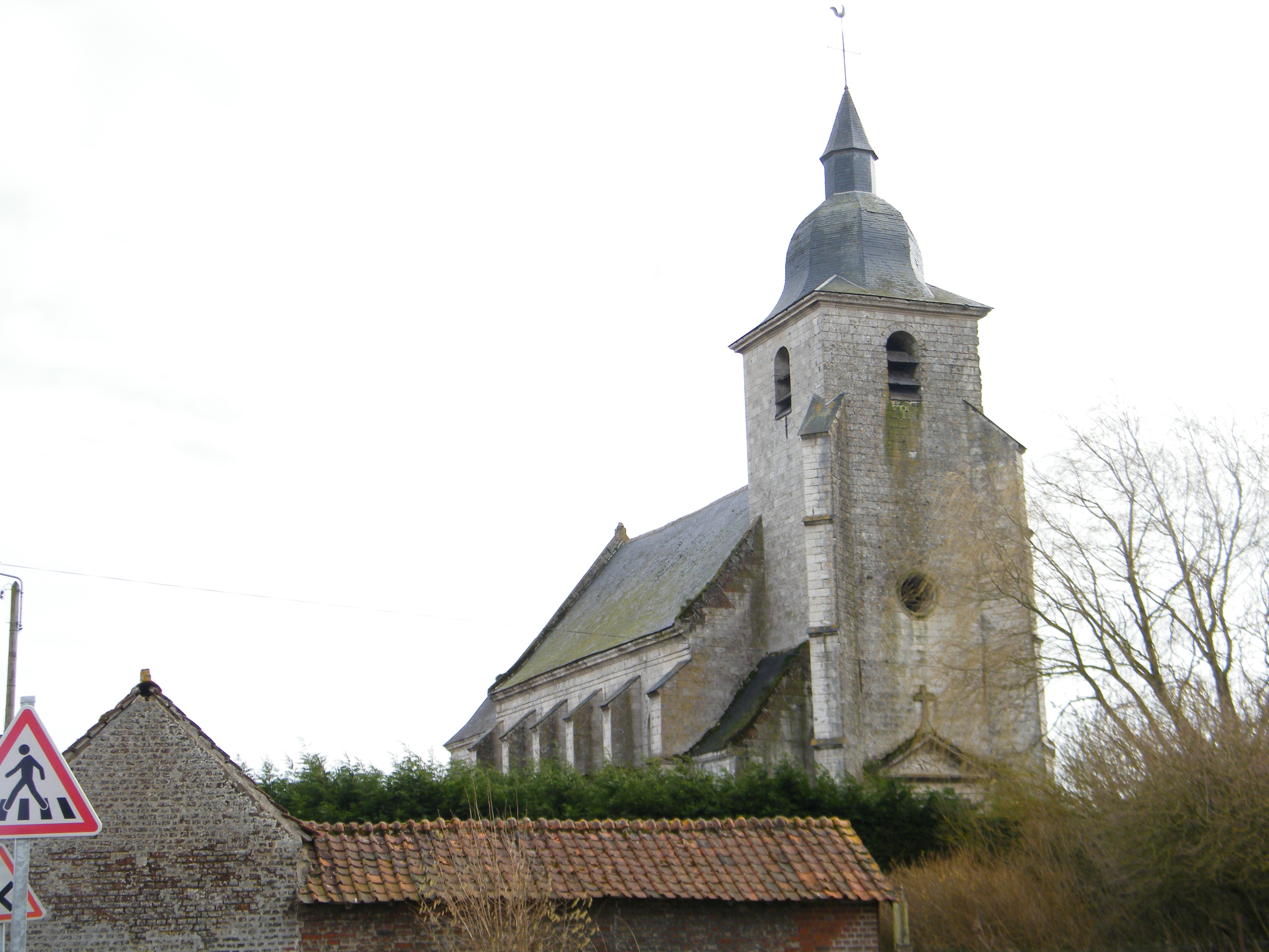 église 1